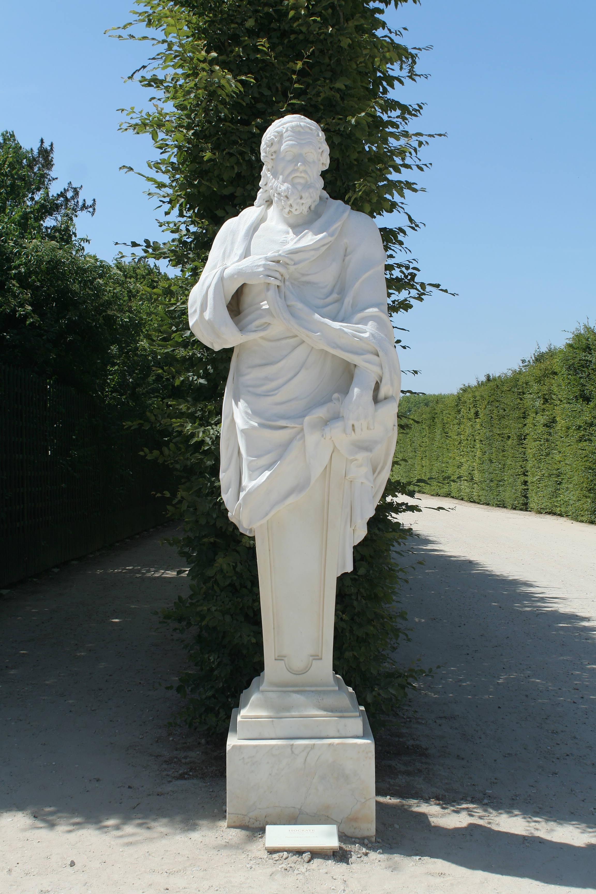 Parc de Versailles, Rond-Point des Philosophes. Isocrate, Pierre Granier (1684-1688) MR1870